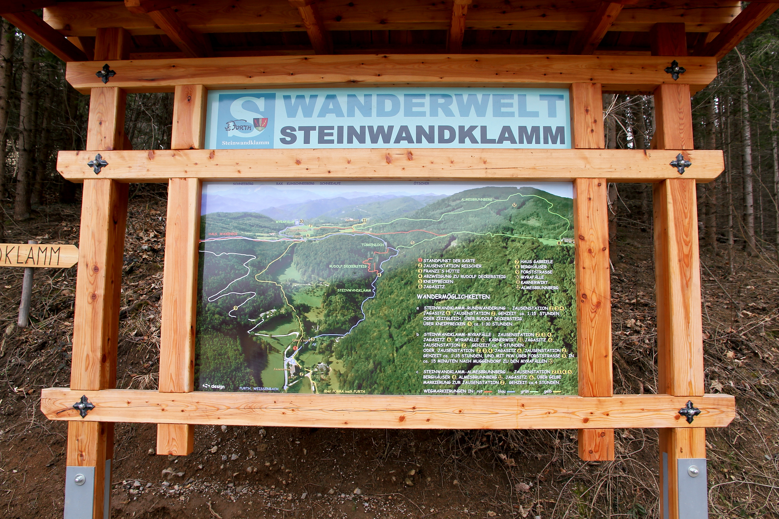 Schautafel beim Zugang zur Steinwandklamm.